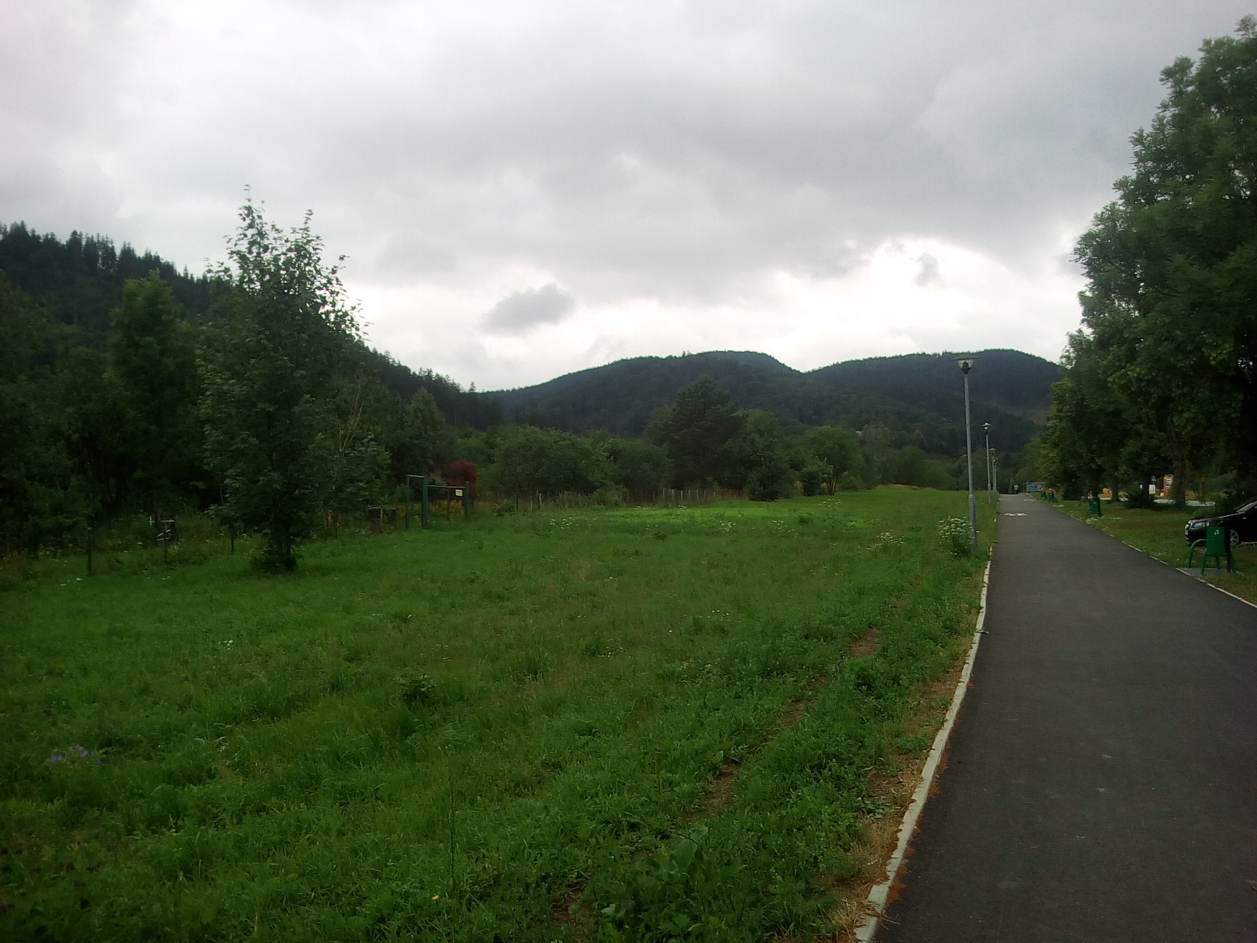 Góry czarne z ulicy kłodzkiej w Jedliny zdrój